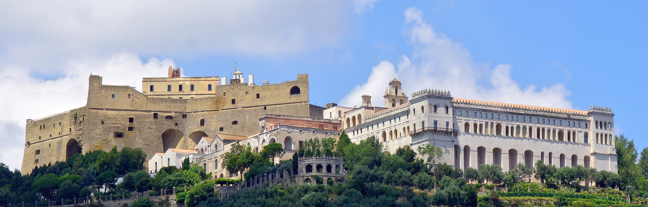 Panorama von der Festung Castel Sant'Elmo und dem Museo Certosa di San Martino auf Stadthügel Vomero von Neapel in Italien. Die Anlage geht auf eine Kirche aus dem 10. JH und ein späteres Kloster zurück. Foto Wolfgang Pehlemann DSC04289